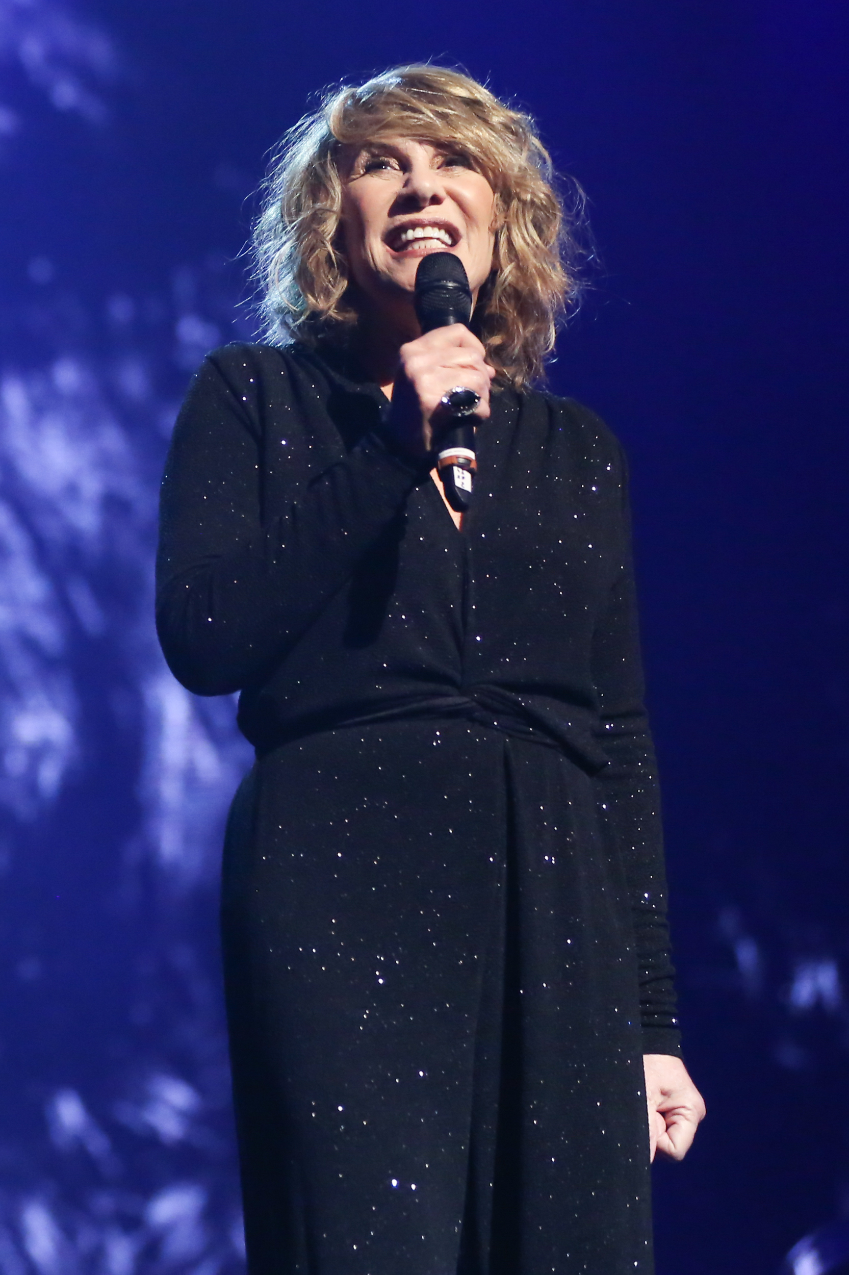 Renata Sorrah - 26° Prêmio da Música Brasileira 2015, no Theatro Municipal, no Centro do Rio de Janeiro/RJ. (10/06/15) Foto: Roberto Filho/Divulgacão